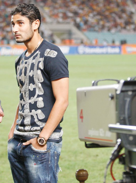 traoui